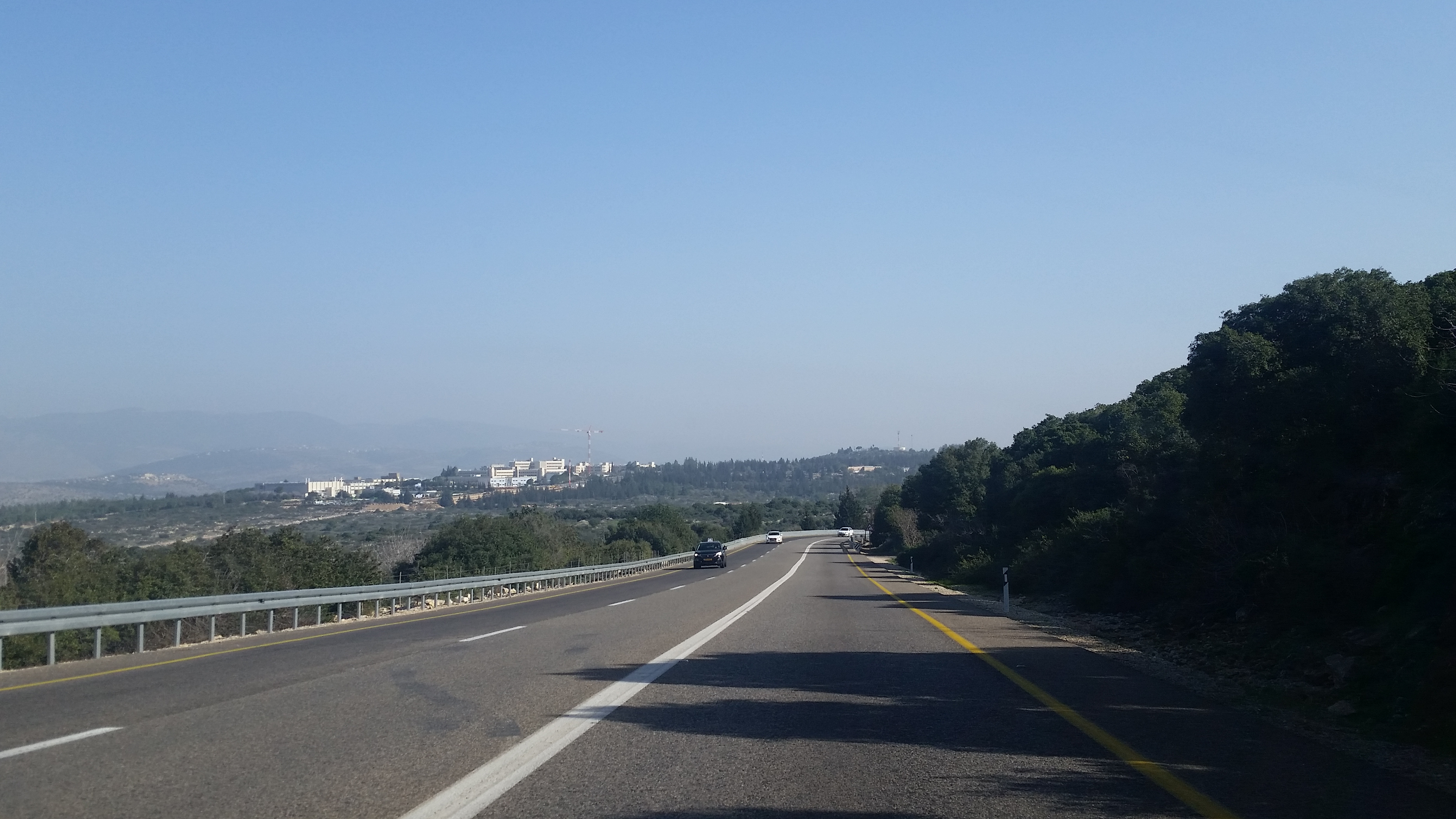 כביש 784 בין צומת יודפת לצומת רפאל. ברקע על הרכס רואים את מבני רפאל.